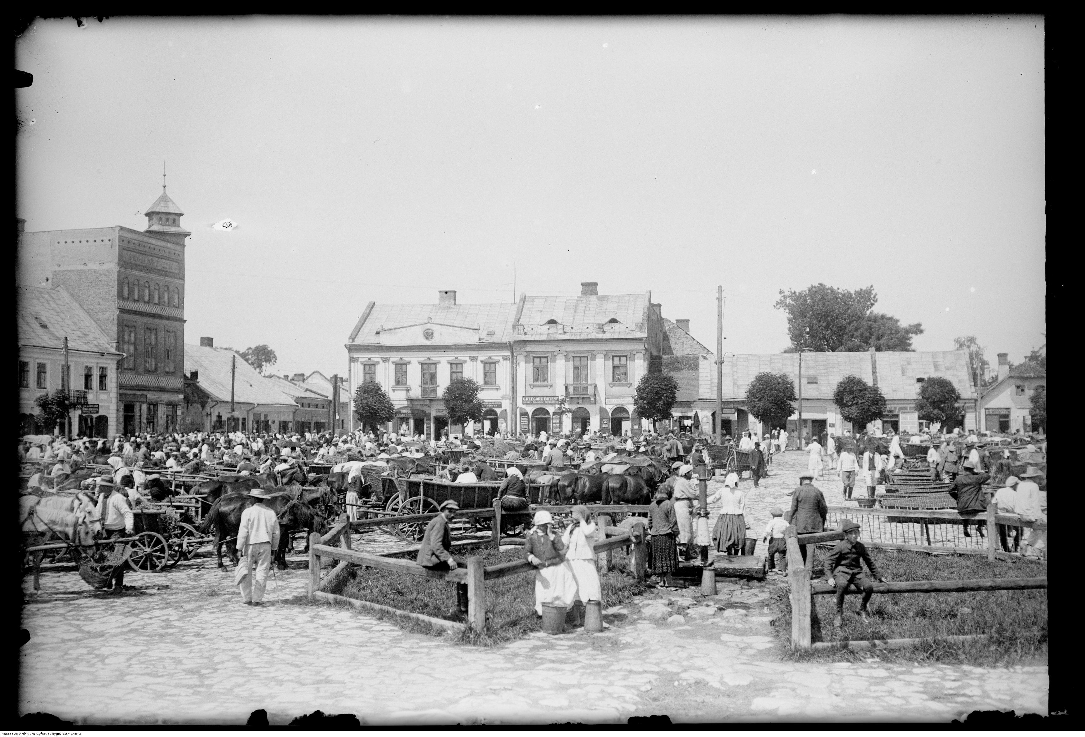 Jarmark na rynku miejskim. Widoczna m.in. przyjezdna ludność wiejska i furmanki konne.